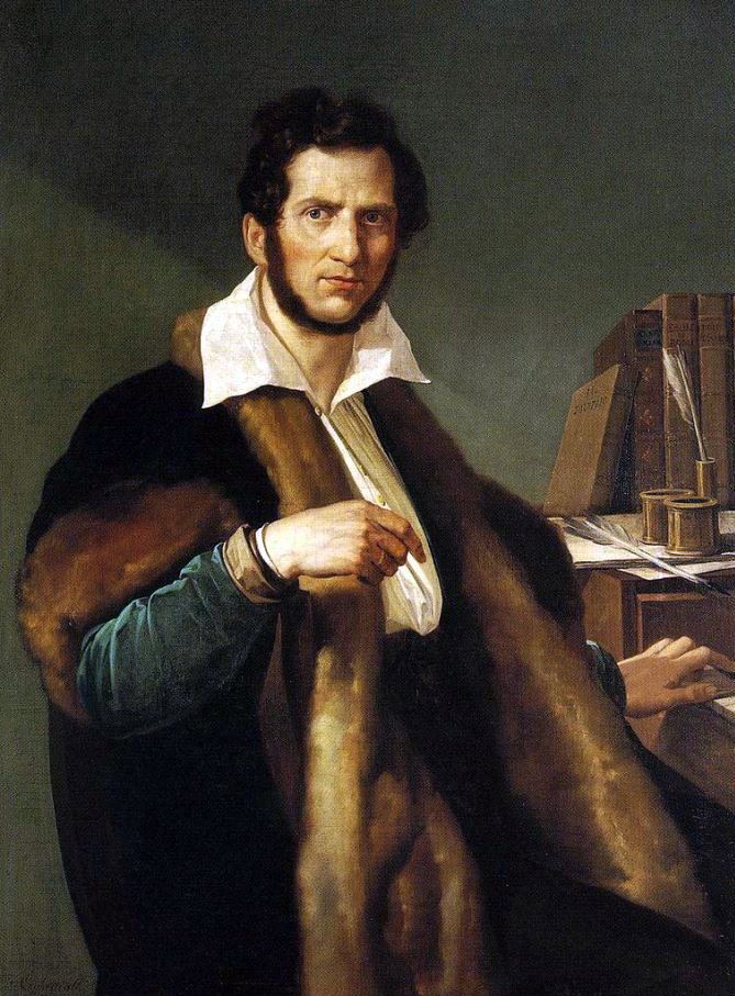 Ritratto di Gaetano Donizetti, olio su tela, di Francesco Coghetti, 1837